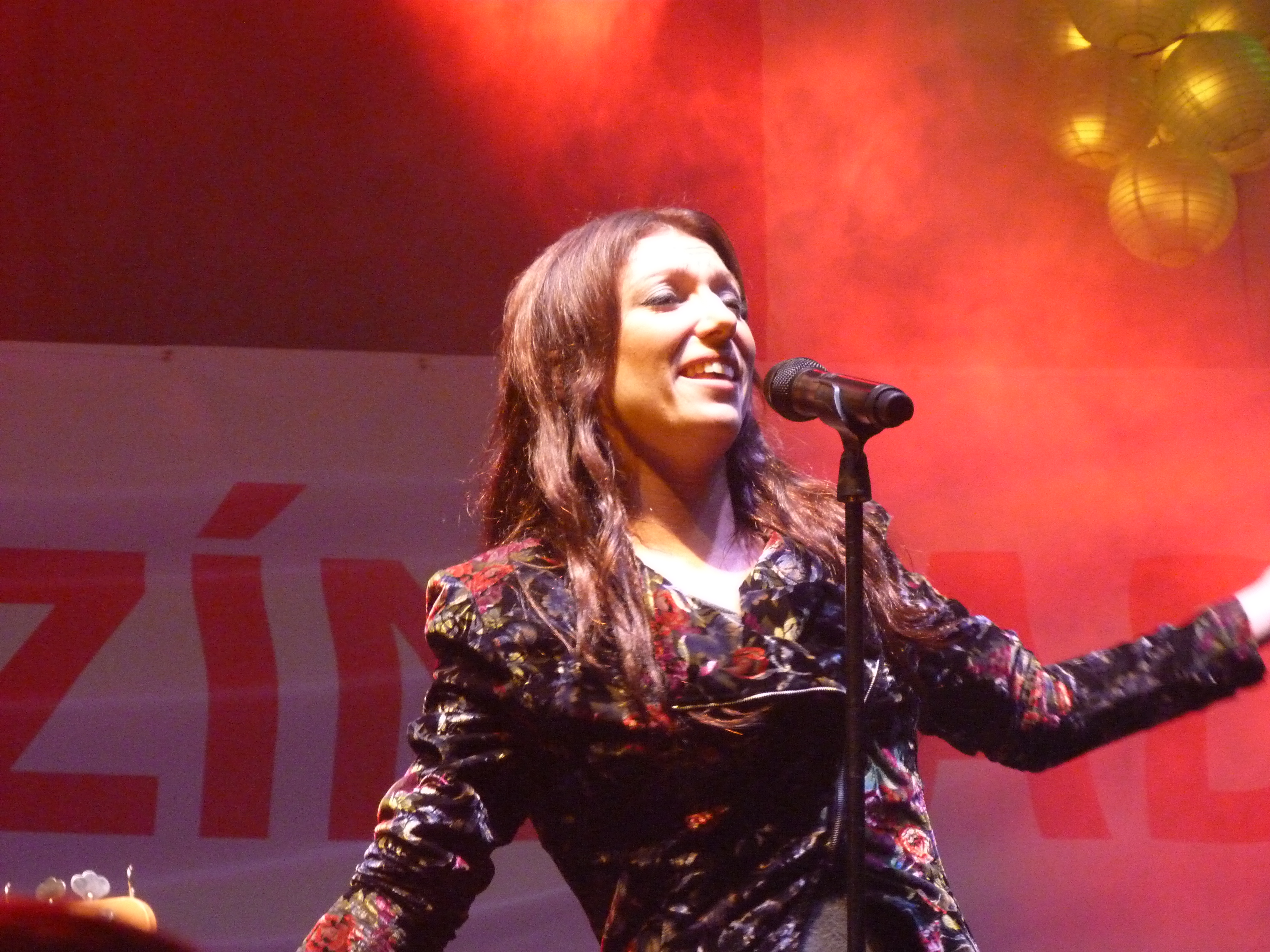 A felvétel 2014. szeptember 12-én, pénteken készült Budapesten, a 23. Budavári Borfesztiválon. Nagyszínpad, Rúzsa Magdi. Források Bor és Pia borpiaci szakmai magazin 2014. augusztus Borfesztivál Melléklet 23. Budavári Borfesztivál kiállítási tájékoztató ©© Derzsi Elekes Andor, Budapest, 2014, A kép és filmfelvételek egészben, vagy részletekben másolását, bármilyen úton történő sokszorosítását és felhasználását a szerző ellenérték nélkül, jogutódjaira is kihatóan megengedi. Az engedély kiterjed a kereskedelmi célú hasznosításra is. Kéri azonban nevének feltüntetését a felhasználás során. A Metapolisz sorozat valamennyi képe és filmje Creative Commons alatti valamint kereskedelmi - for profit - célra is felhasználható. Ajánlott hivatkozás: Derzsi Elekes Andor: Metapolisz DVD line